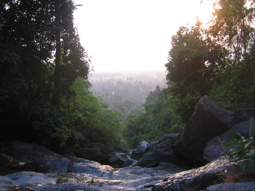 Blick von der Spitze des Krathing Waterfall über den Nationalpark